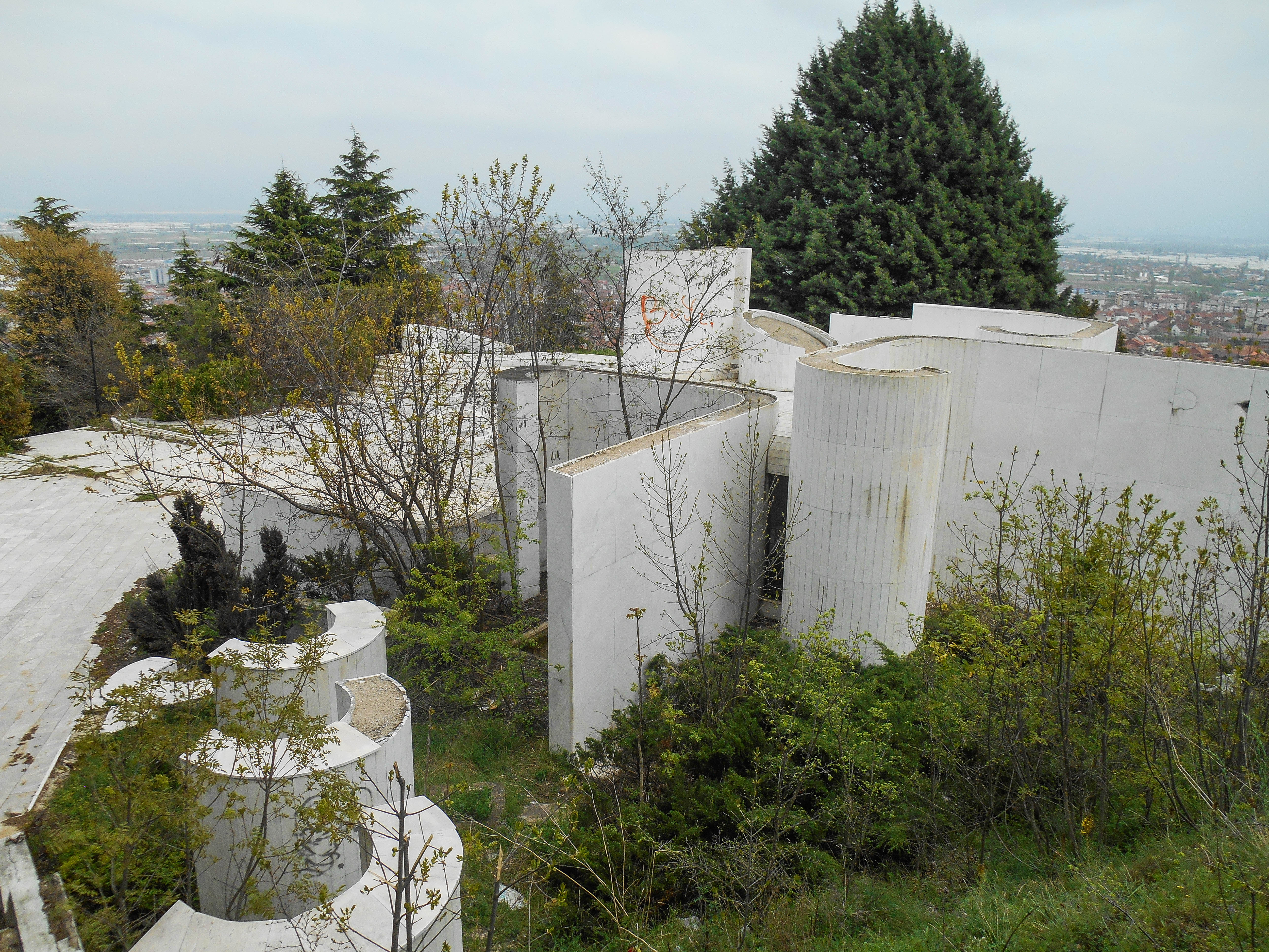 Споменик Костурница